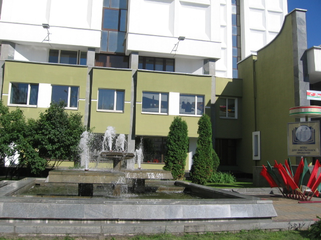 На улице Московская, возле Академии управления